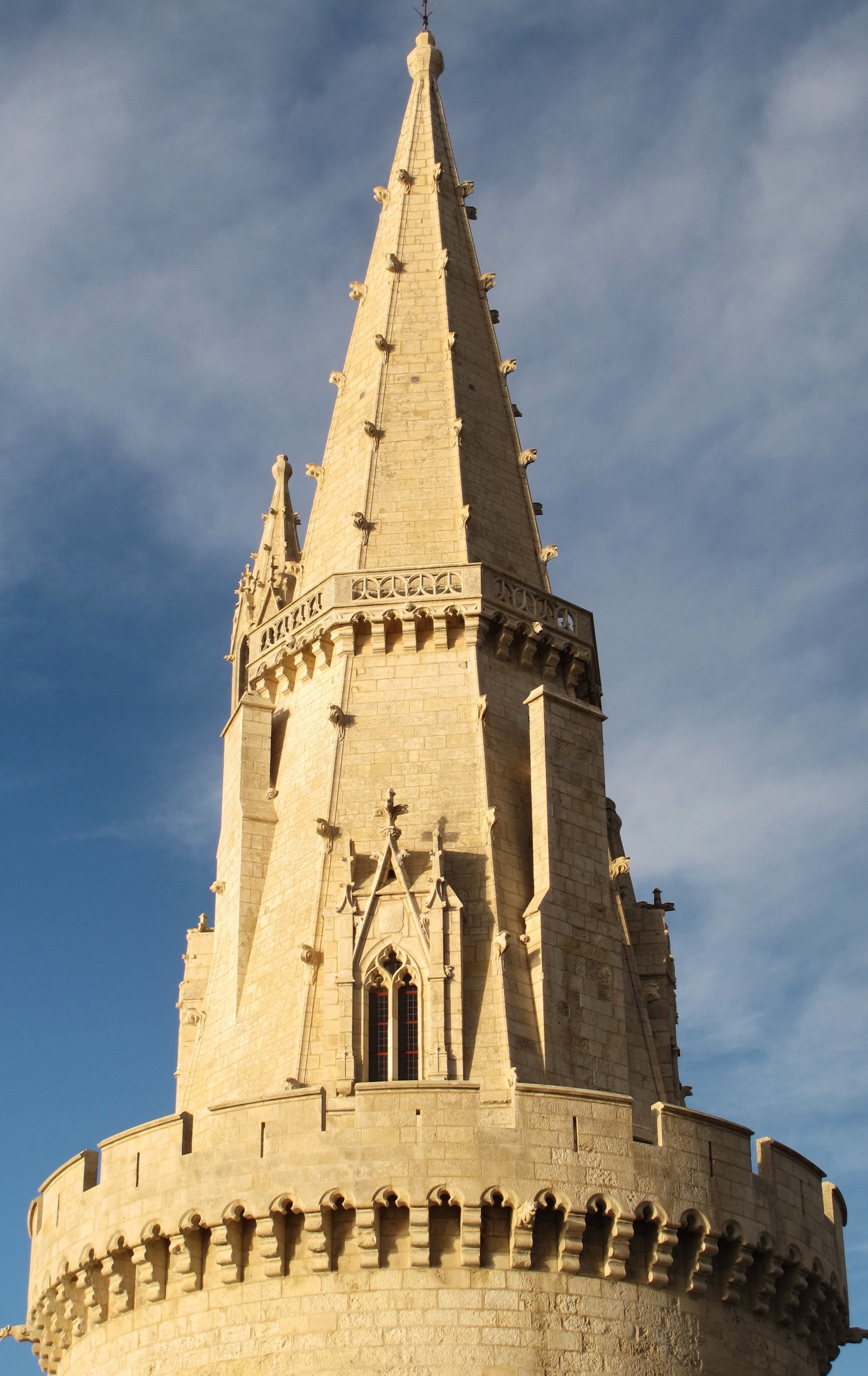 Flèche de la Tour de la Lanterne, La Rochelle, France